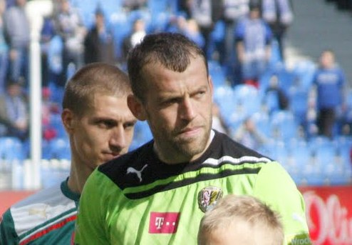 Słowacki bramkarz piłkarski Marián Kelemen